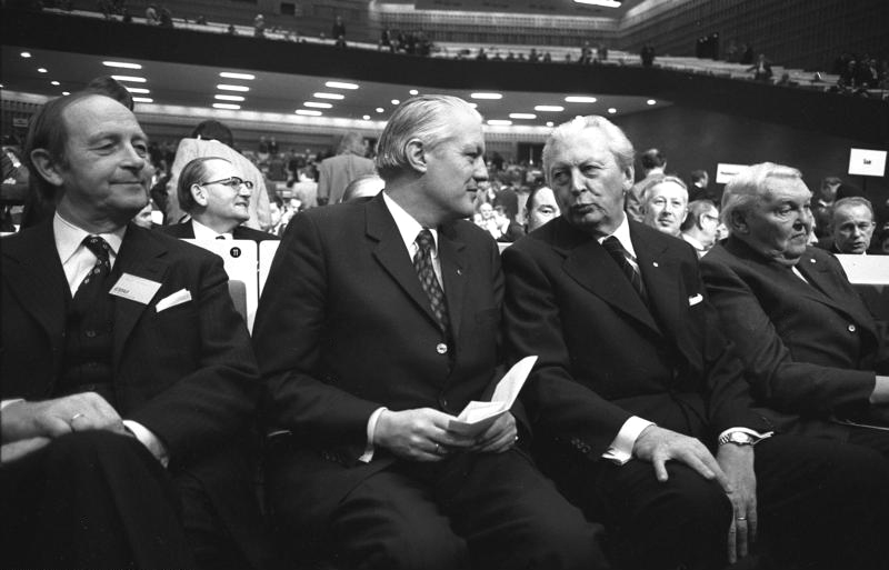 22. Bundesparteitag der CDU in Hamburg (v.l.n.r: Hans Karl Filbinger, Dr. Gerhard Stoltenberg, Kurt Georg Kiesinger, Ludwig Erhard) [im Plenum sitzend] 18.-20.11.1973